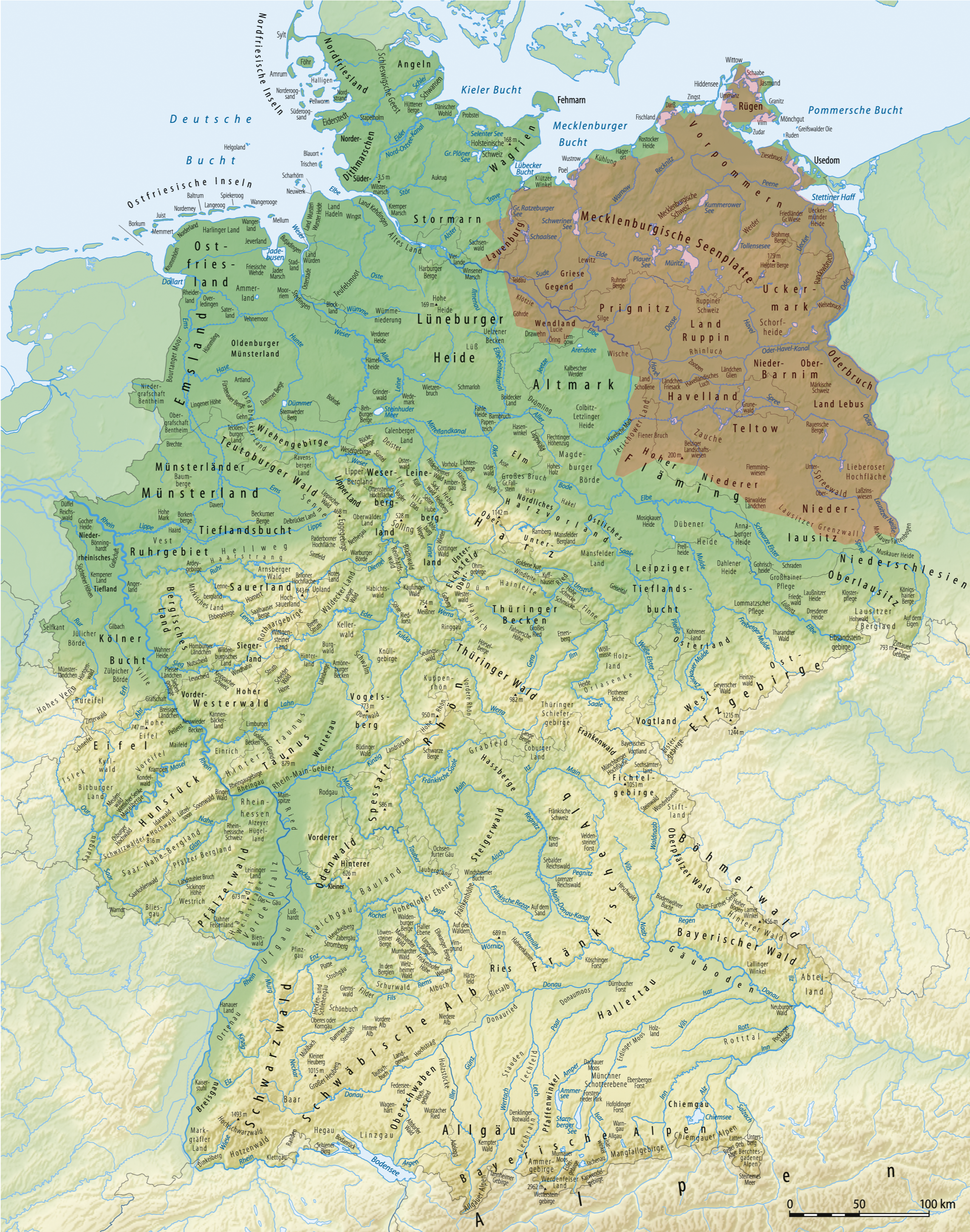 Karte der Verteilung von Ortsnamen mit der Endung -ow in Deutschland